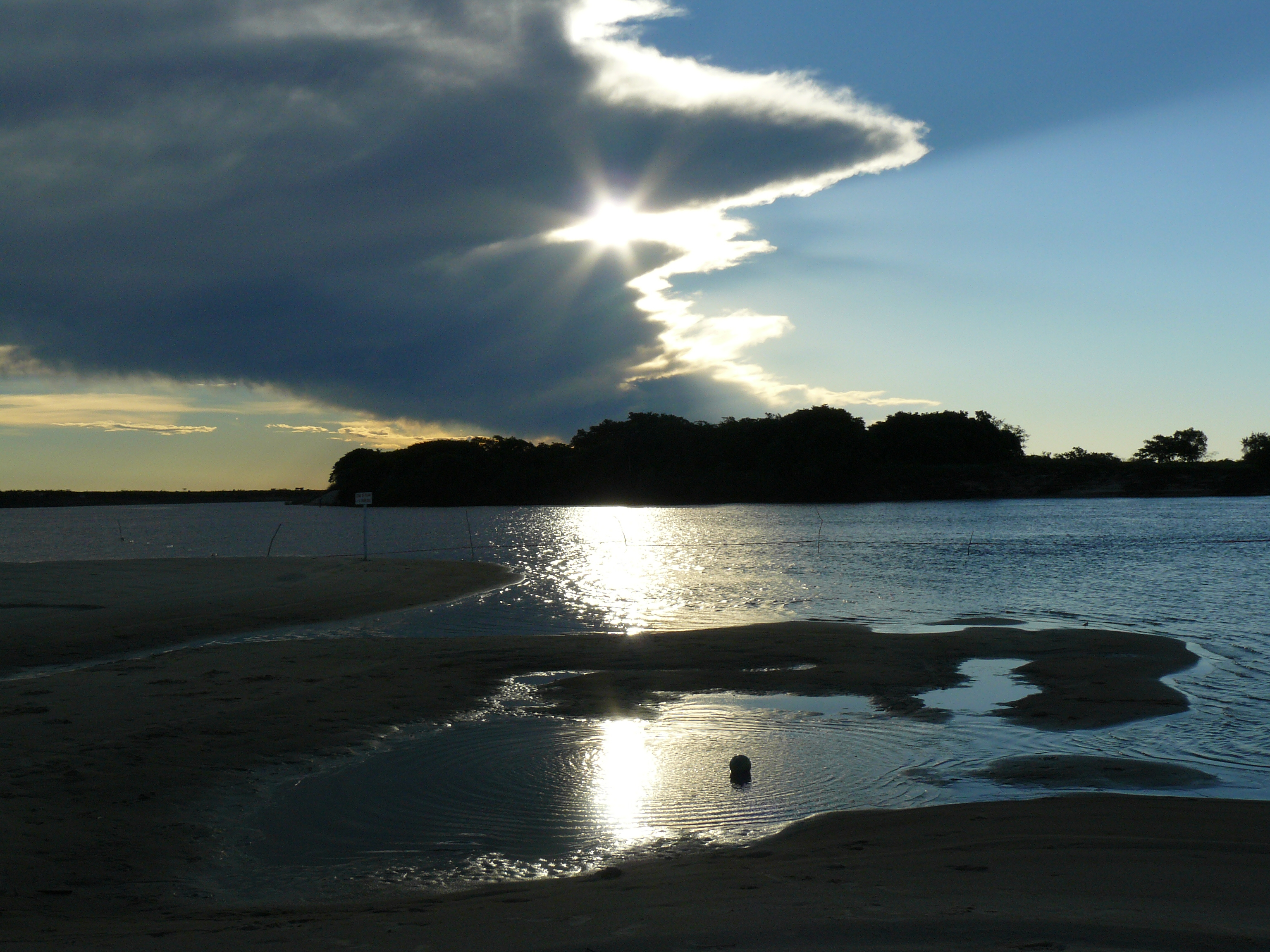 paisaje genérico de un rio en Paraguay